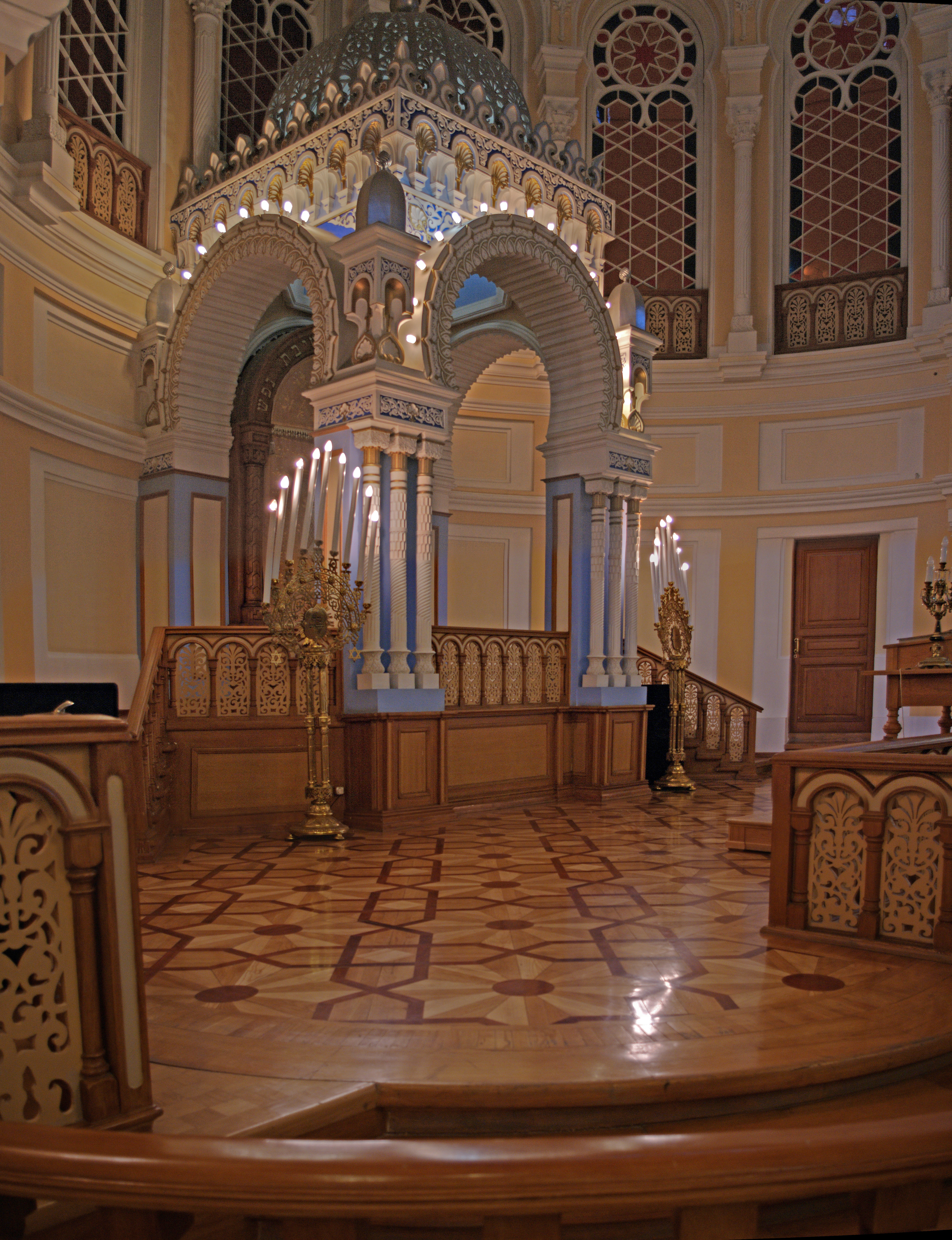 Санкт-Петербург. Cинагога Большая хоральная